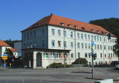 Schiller-Gymnasium Heidenheim, 2007